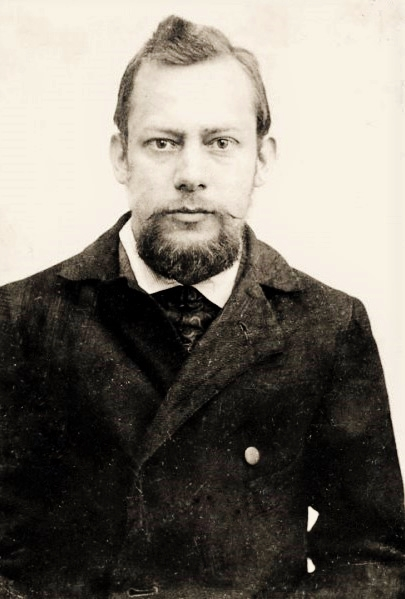 Ivan Platonovič Kaljaev (1877-1905)